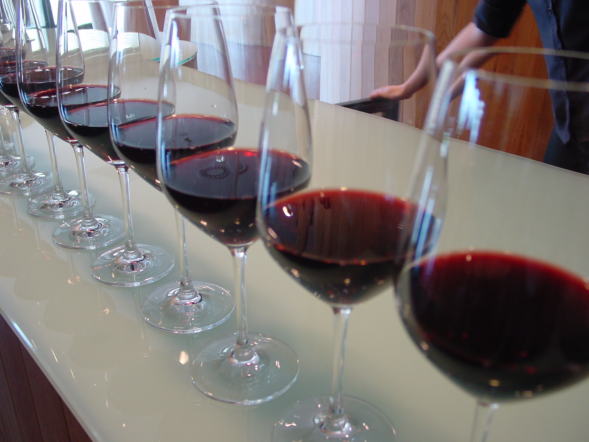 Copas de vino en el Museo Vivancos de Haro en La Rioja